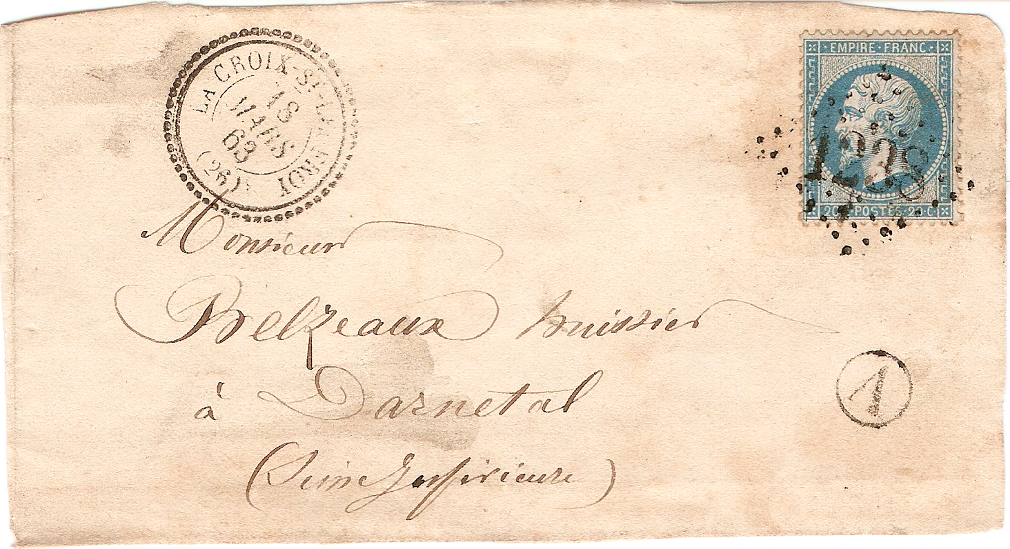 Lettre France La Croix-Saint-Leuffroy 1863, affranchie avec un 20 c bleu Napoléon de 1862 et oblitérée avrec un cachet Gros Chiffres 1238